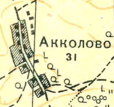 Топографическая карта Ленинградской области, квадрат О-35-24-Б-в (Вохоново), деревня Акколово